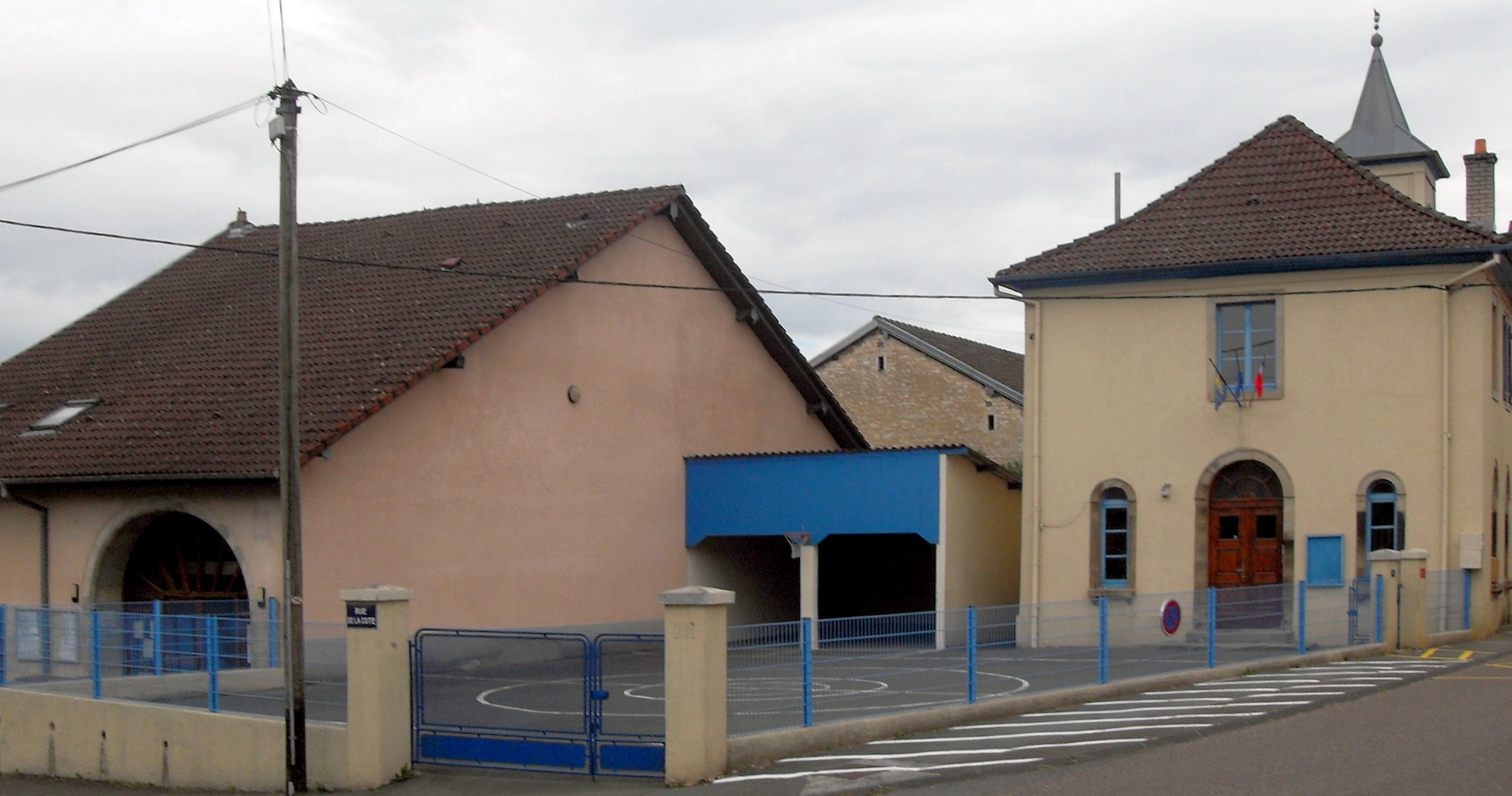 La mairie (gauche) et_l'école_primaire (droit) de Raynans